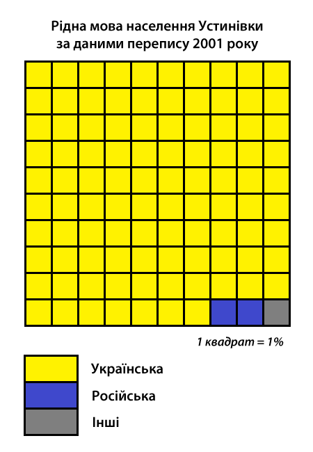 Інфографіка розподілу населення смт Устинівка за рідною мовою згідно з даними перепису 2001 року. Джерело: Розподіл населення Кіровоградської області за рідною мовою (у % до загальної чисельності населення) за переписом 2001 року